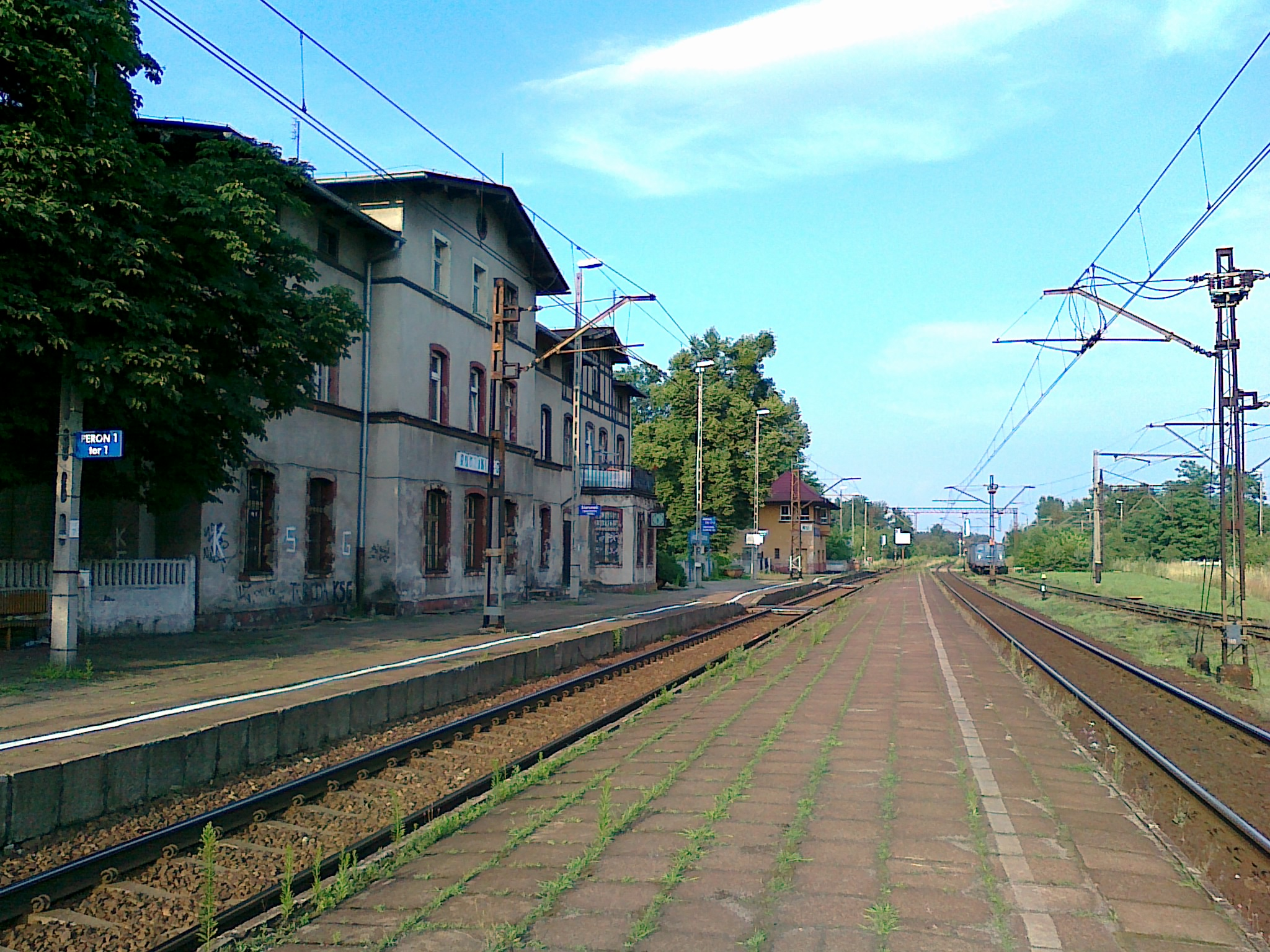 Stacja kolejowa Rudziniec Gliwicki